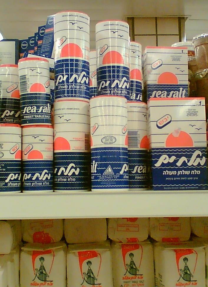 מוצרי תעשיות מלח לישראל על המדף בסופרמרקט. צילם דוד שי.